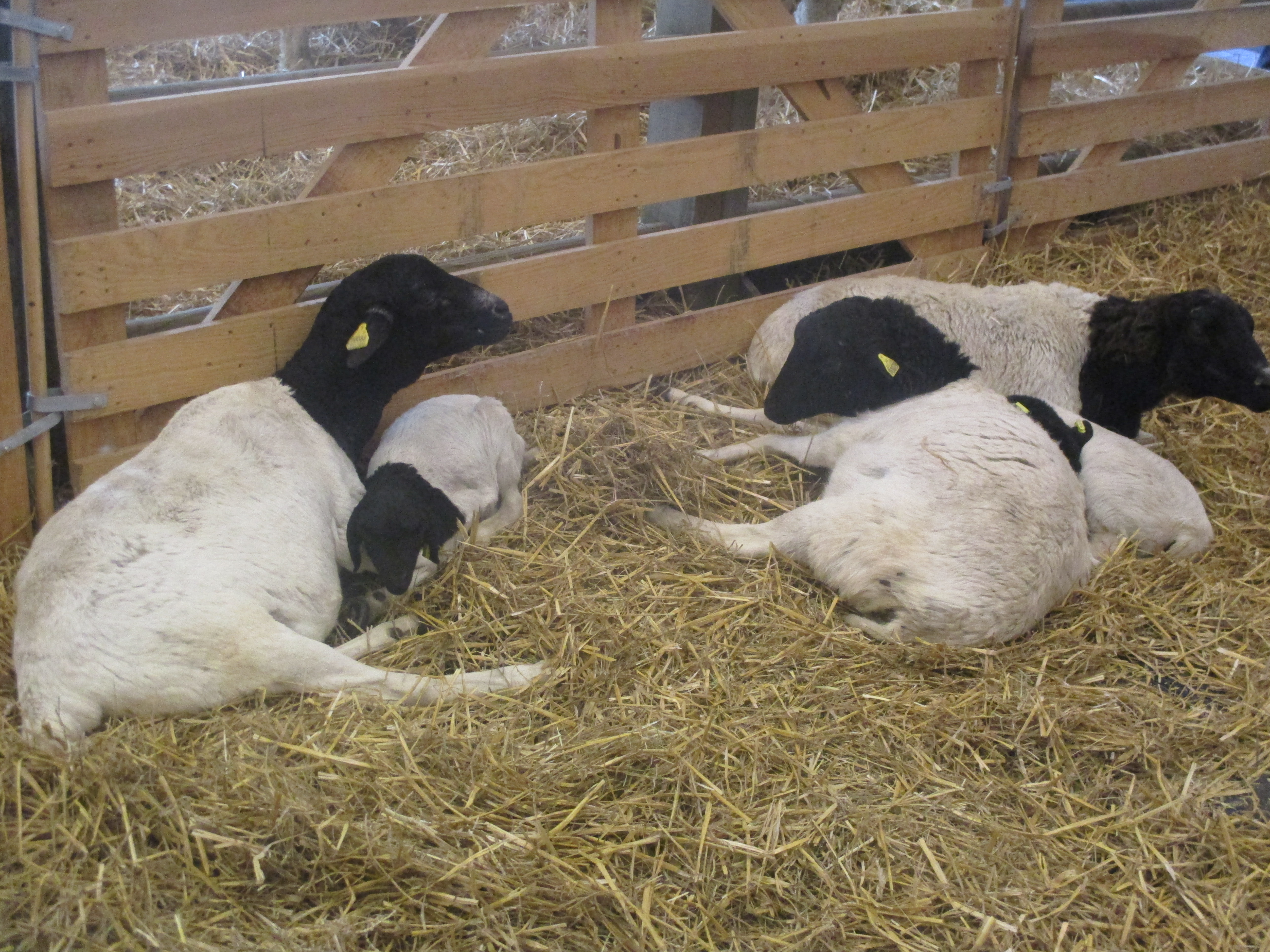 Moutons de Somalie au salon de l'agriculture de la Porte de Versailles à Paris, février 2018.